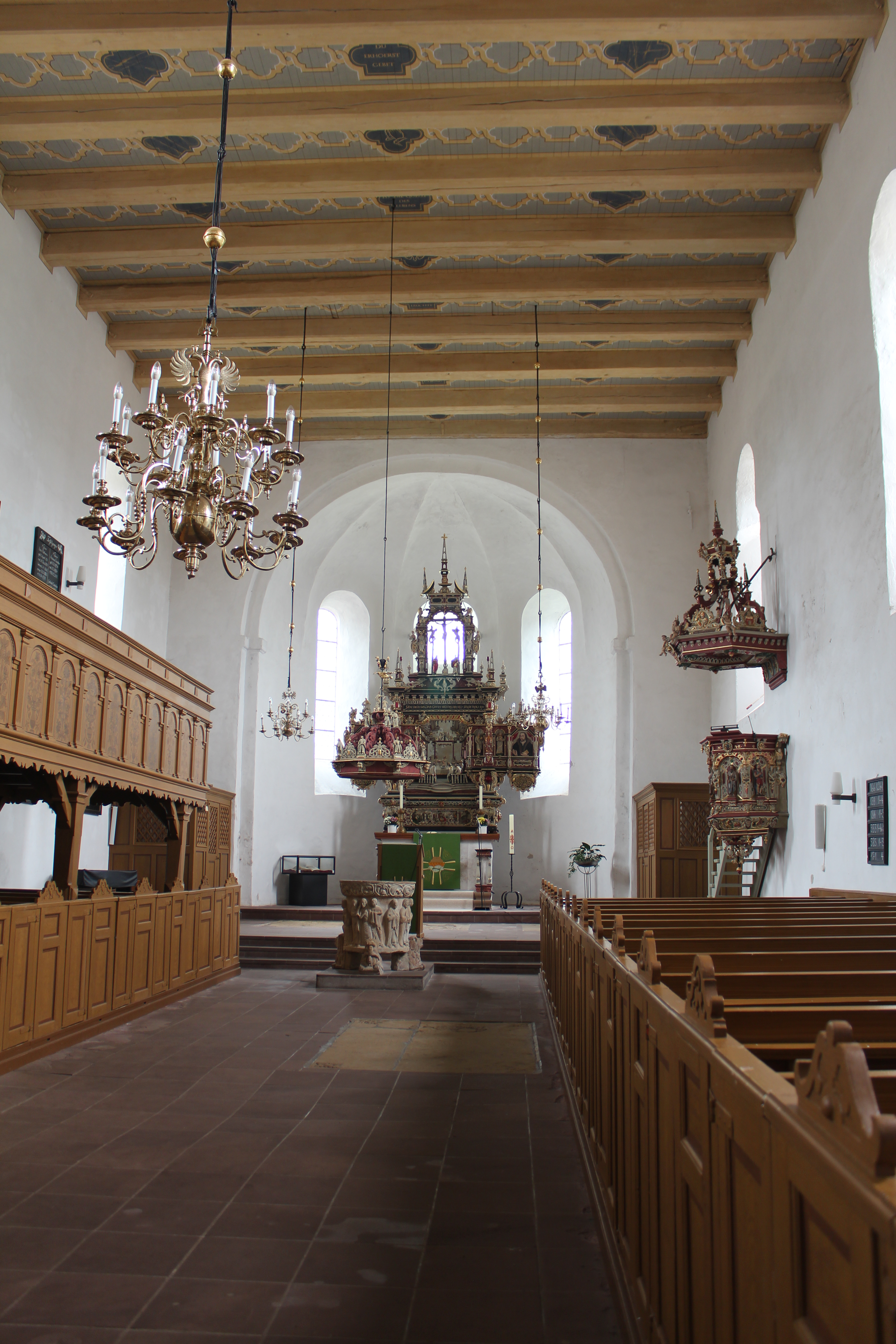 Blick durch das Schiff der Kirche St. Sixtus und Sinicius zu Wangerland-Hohenkirchen zu Altar, Taufstein und Kanzel